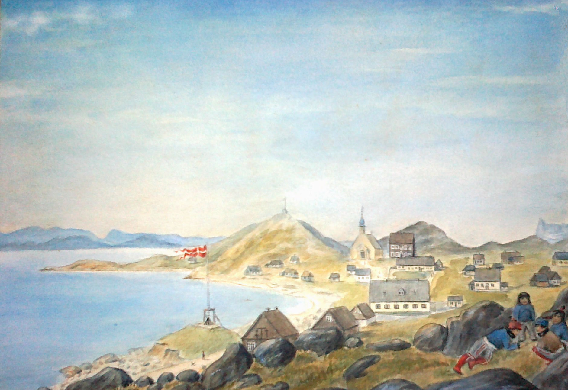 Legende grønlandske børn (måske ved Nuuk). Tegning af Andreas Kornerup.